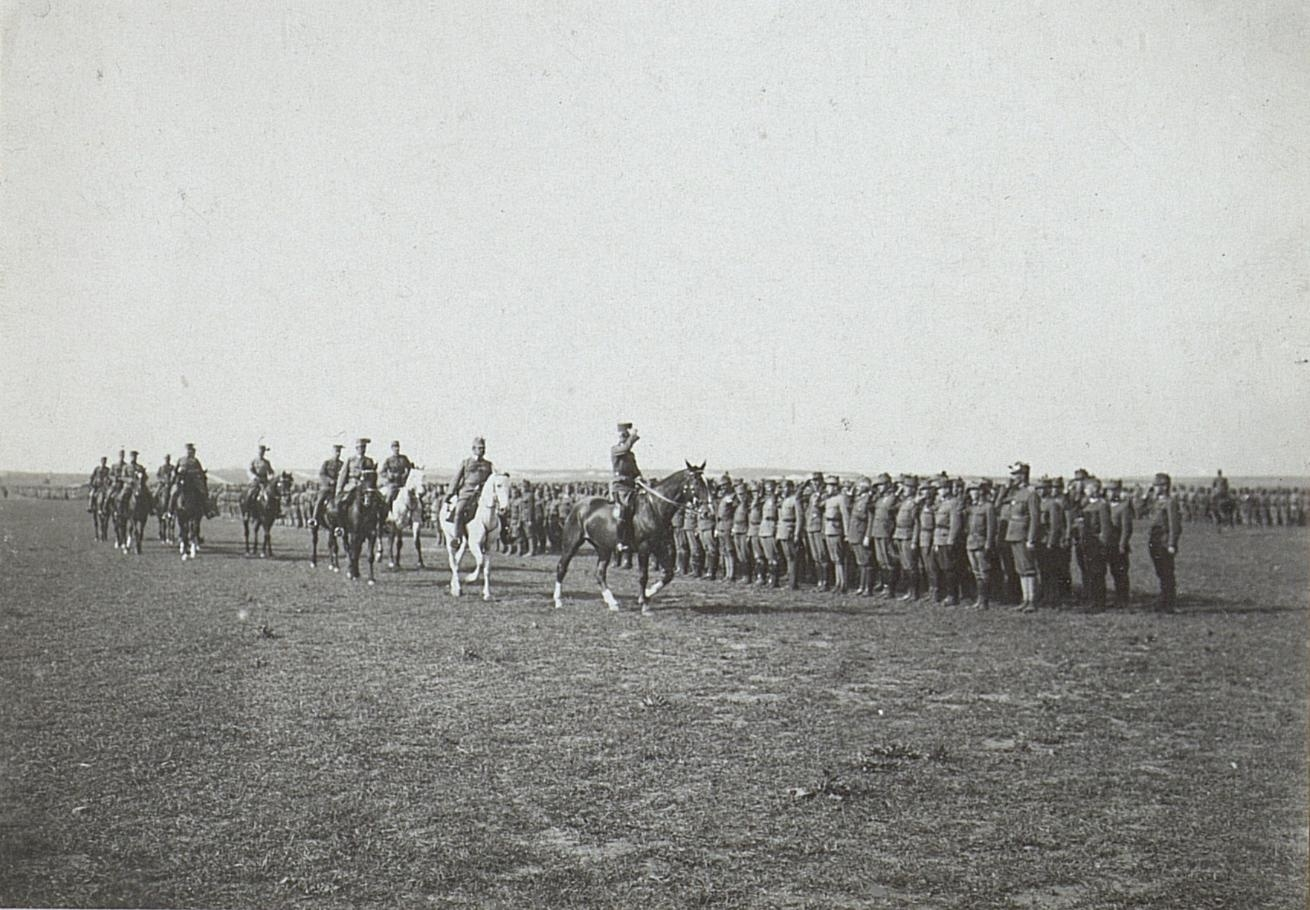 Parade, Abschreiten der Front durch Generaloberst Kirchbach